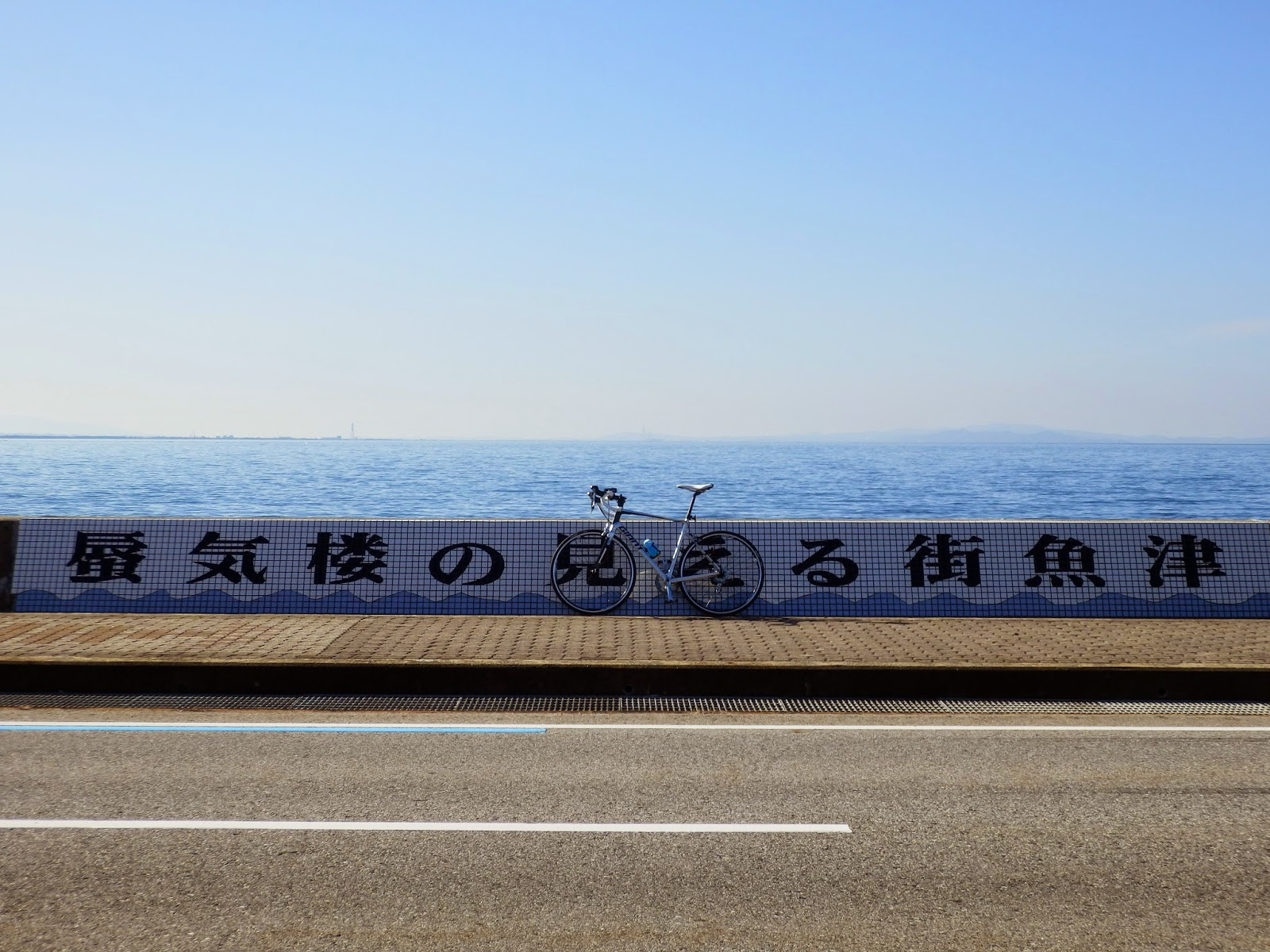 富山湾岸沿いのサイクリングロード 海沿いや廃線跡、吊り橋などがある。